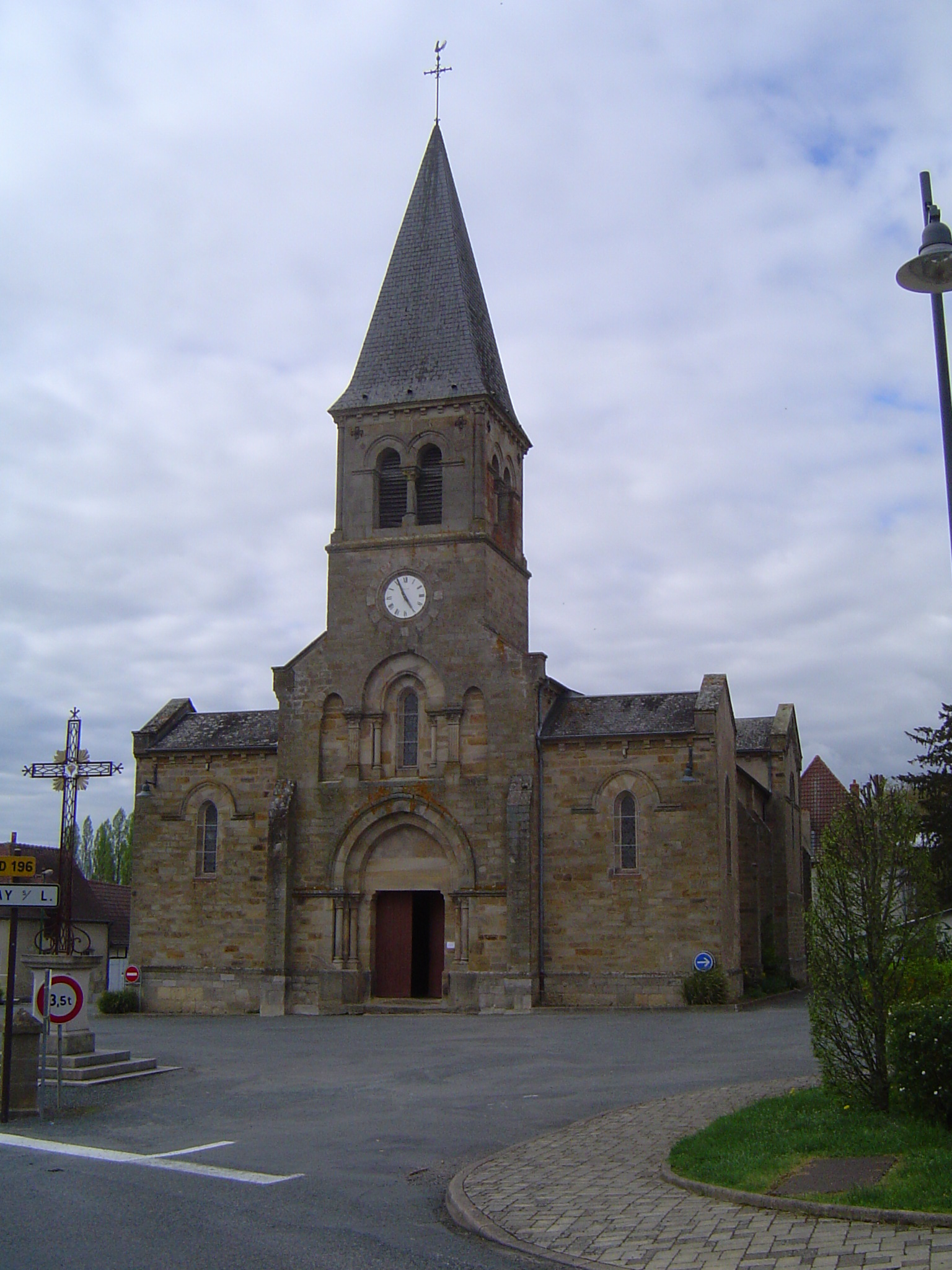 Cronat (église 1)